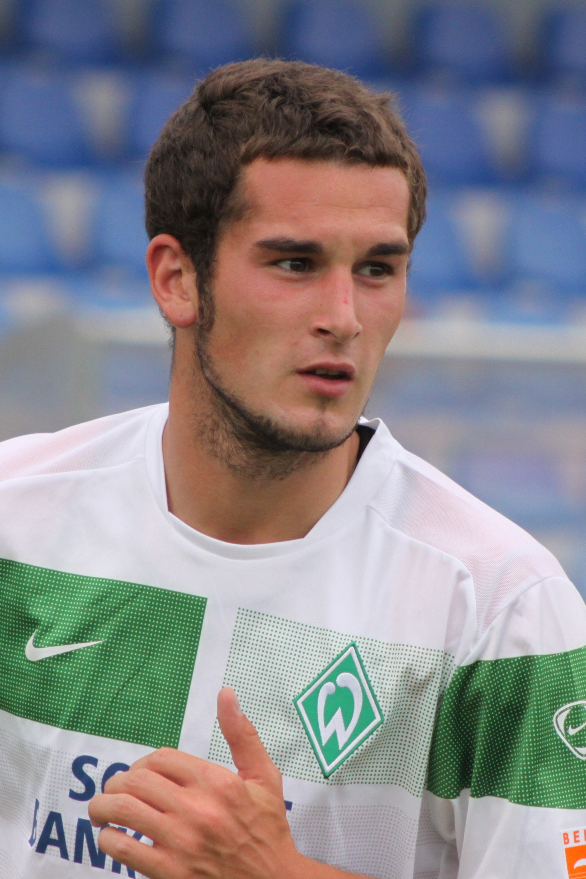 Dominik Schmidt - SV Werder Bremen (1)